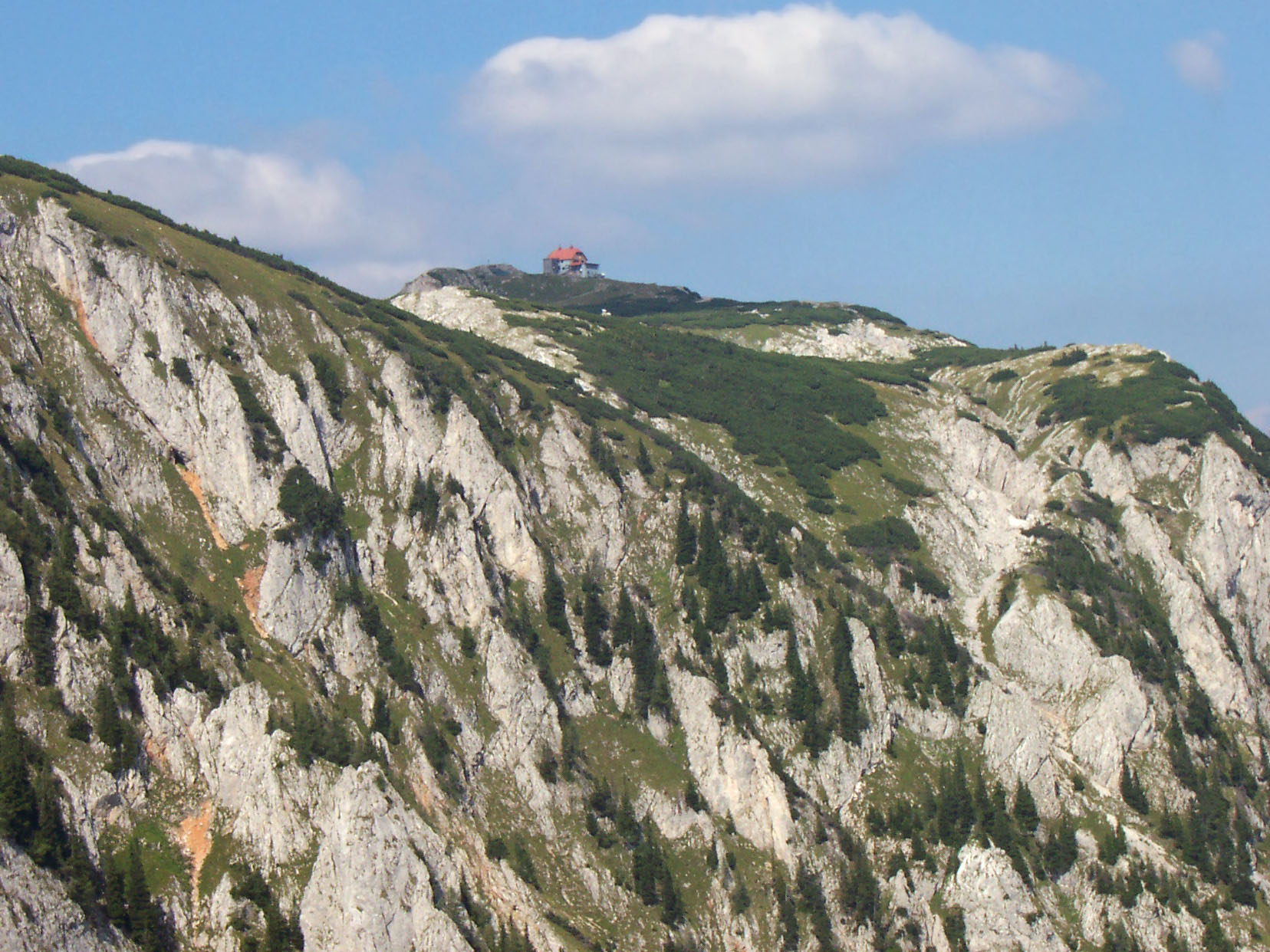 Schneealpe mit Schneealpenhaus am Horizont